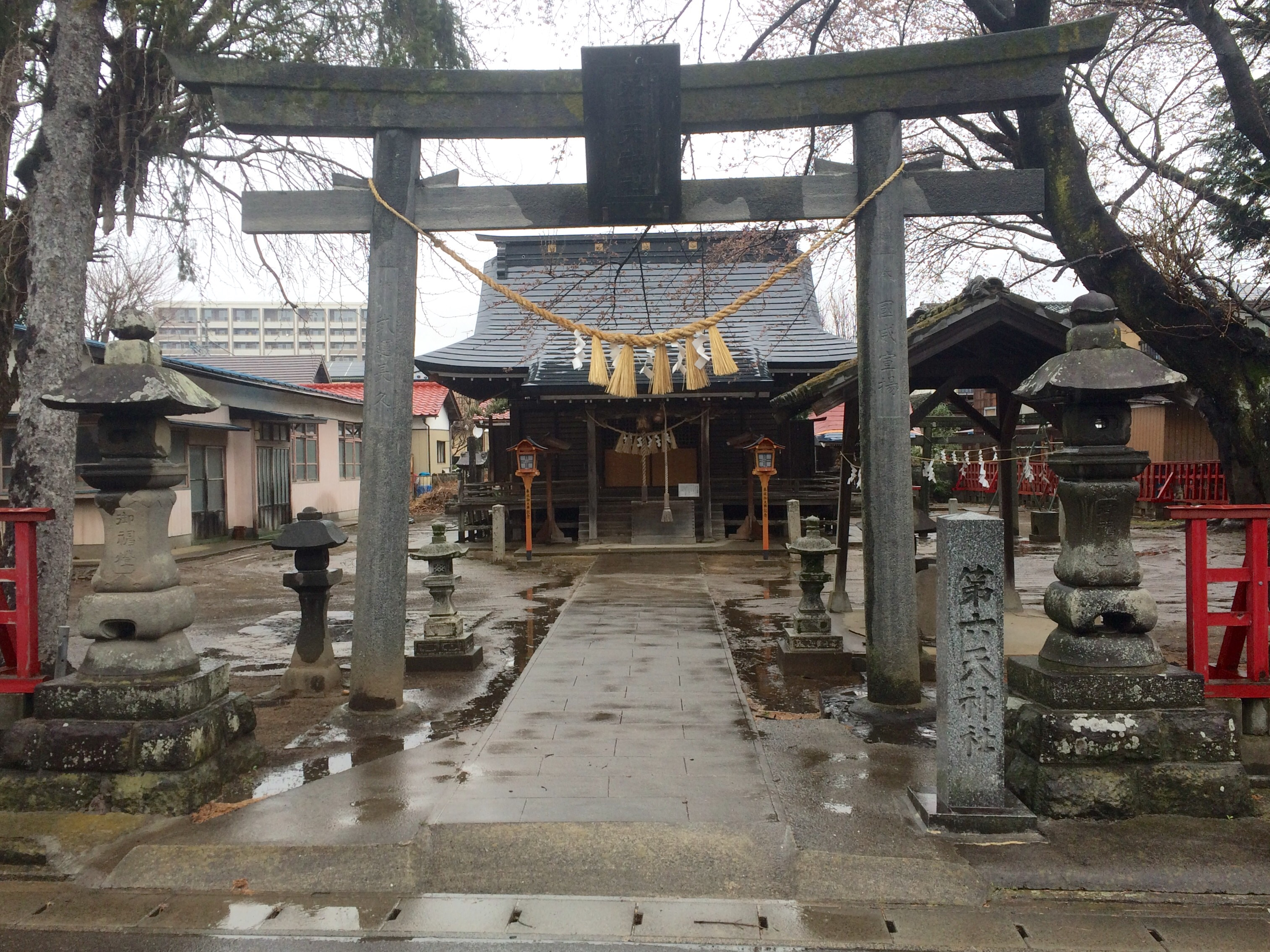 宮城県名取市に鎮座する第六天神社の鳥居、正面奥に拝殿が見える。